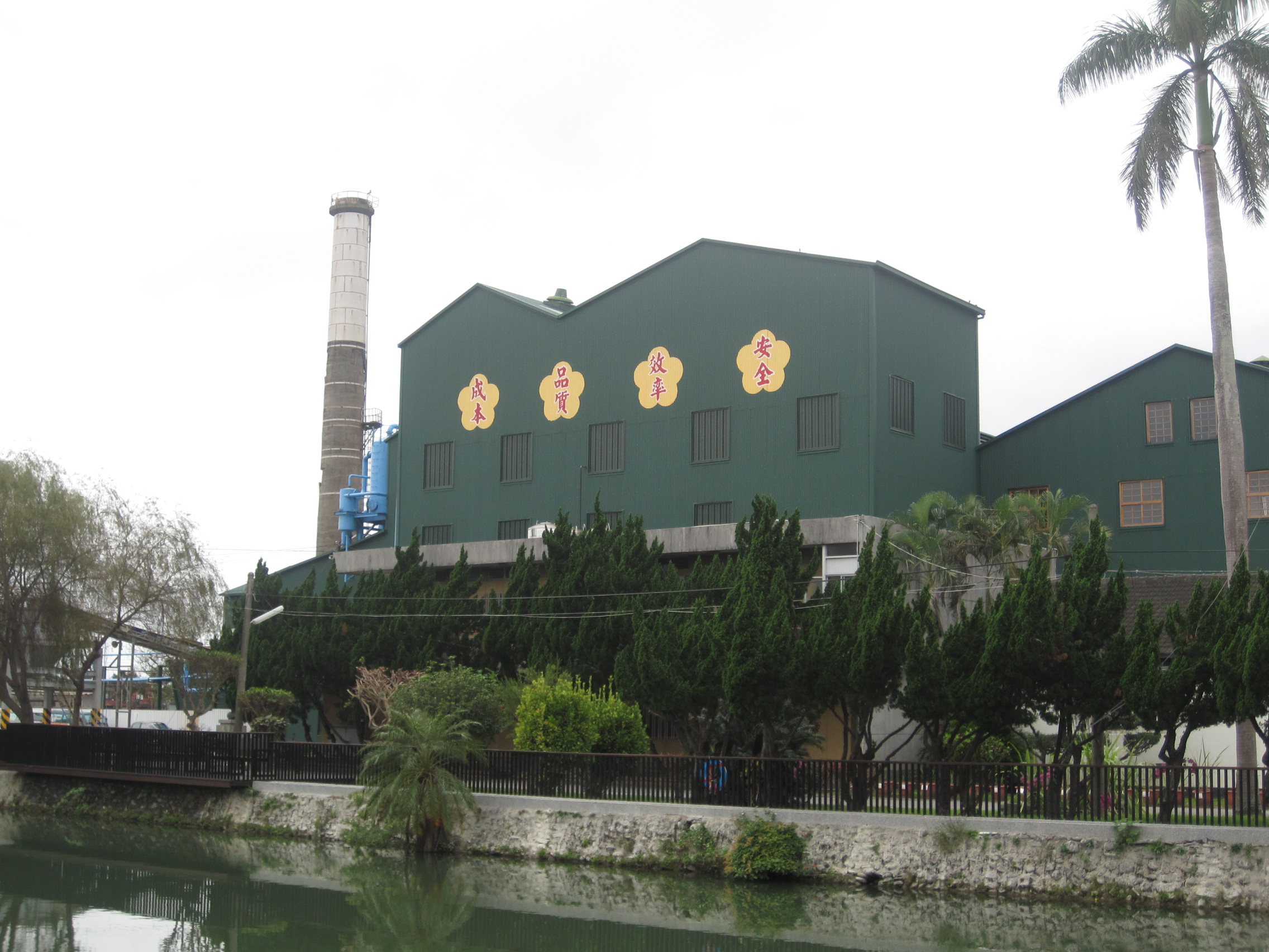 臺東糖廠廠房